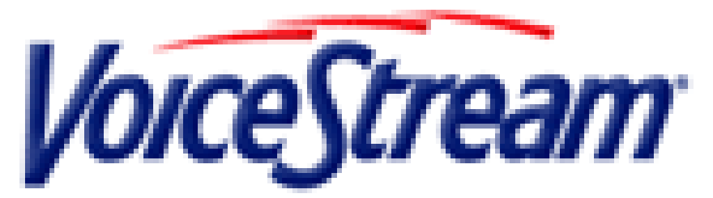 Logo der VoiceStram